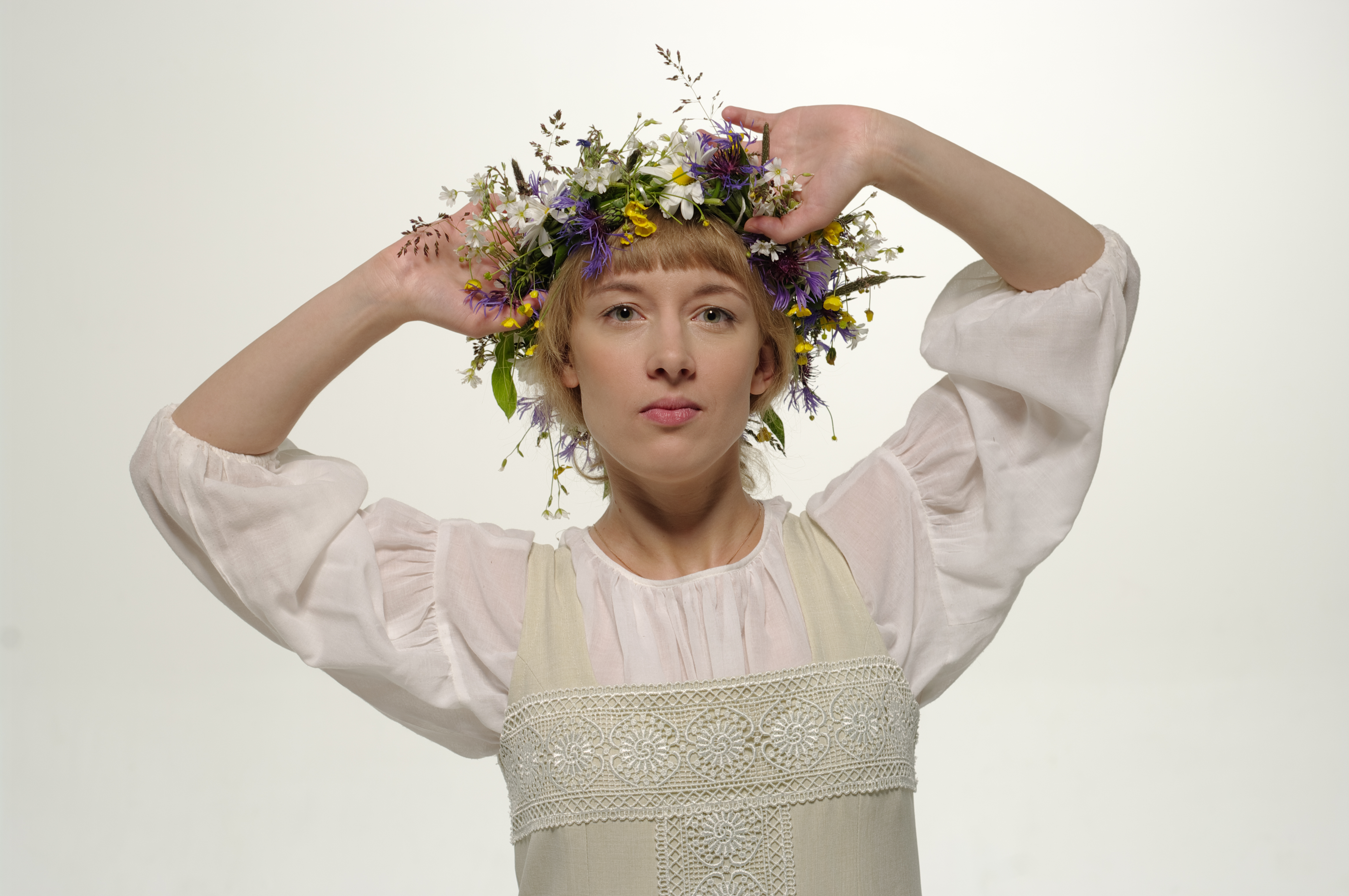 Liisa Pulk lavastuses 'Oblomov'.